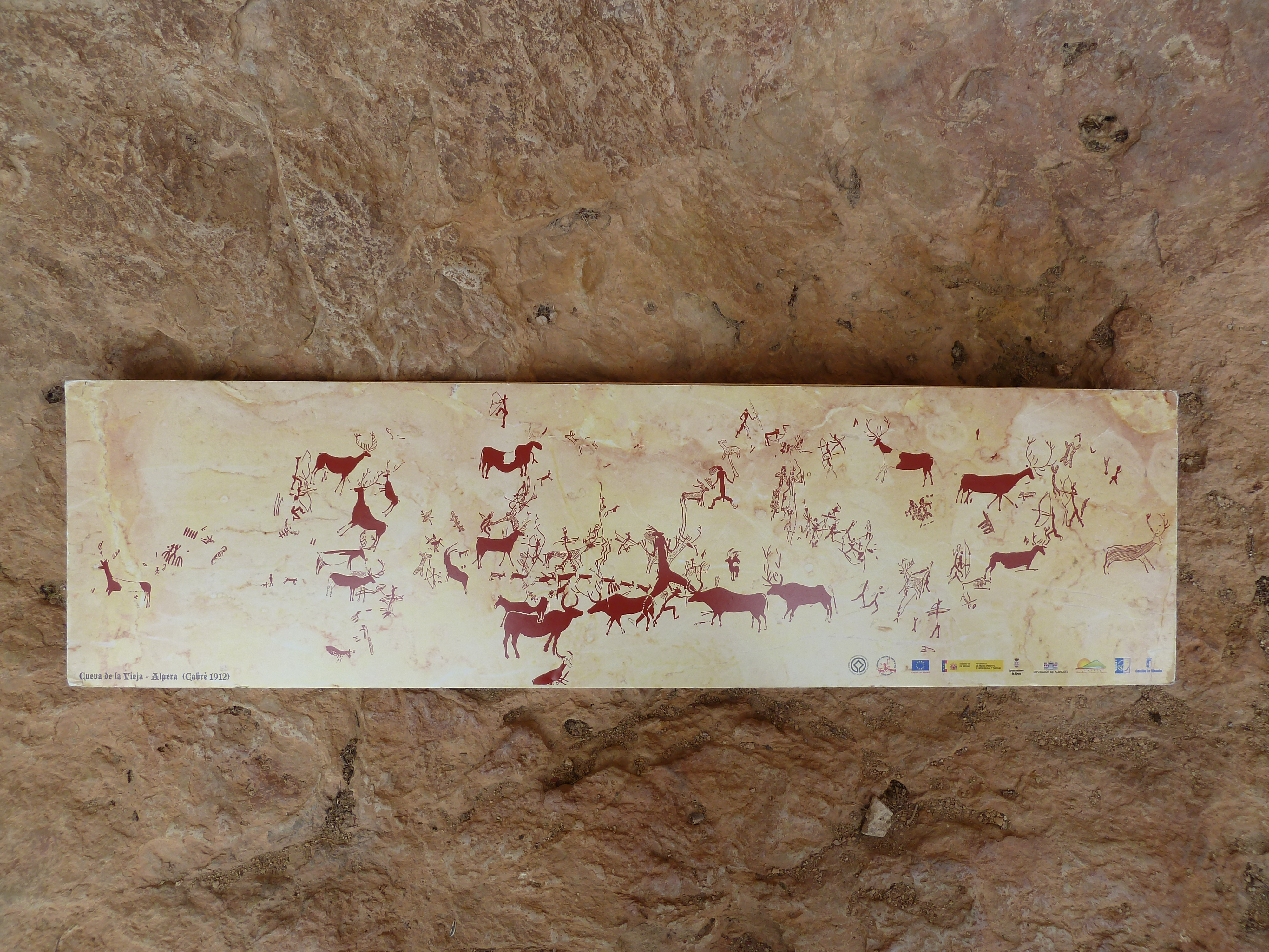 Reproducción del mural